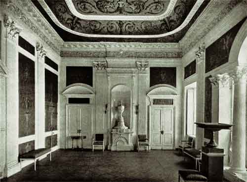 Золотой зал в Белом домике усадьбы Никольское-Урюпино (1776-78). Фото из журнала «Старые годы». (1910. Июль)